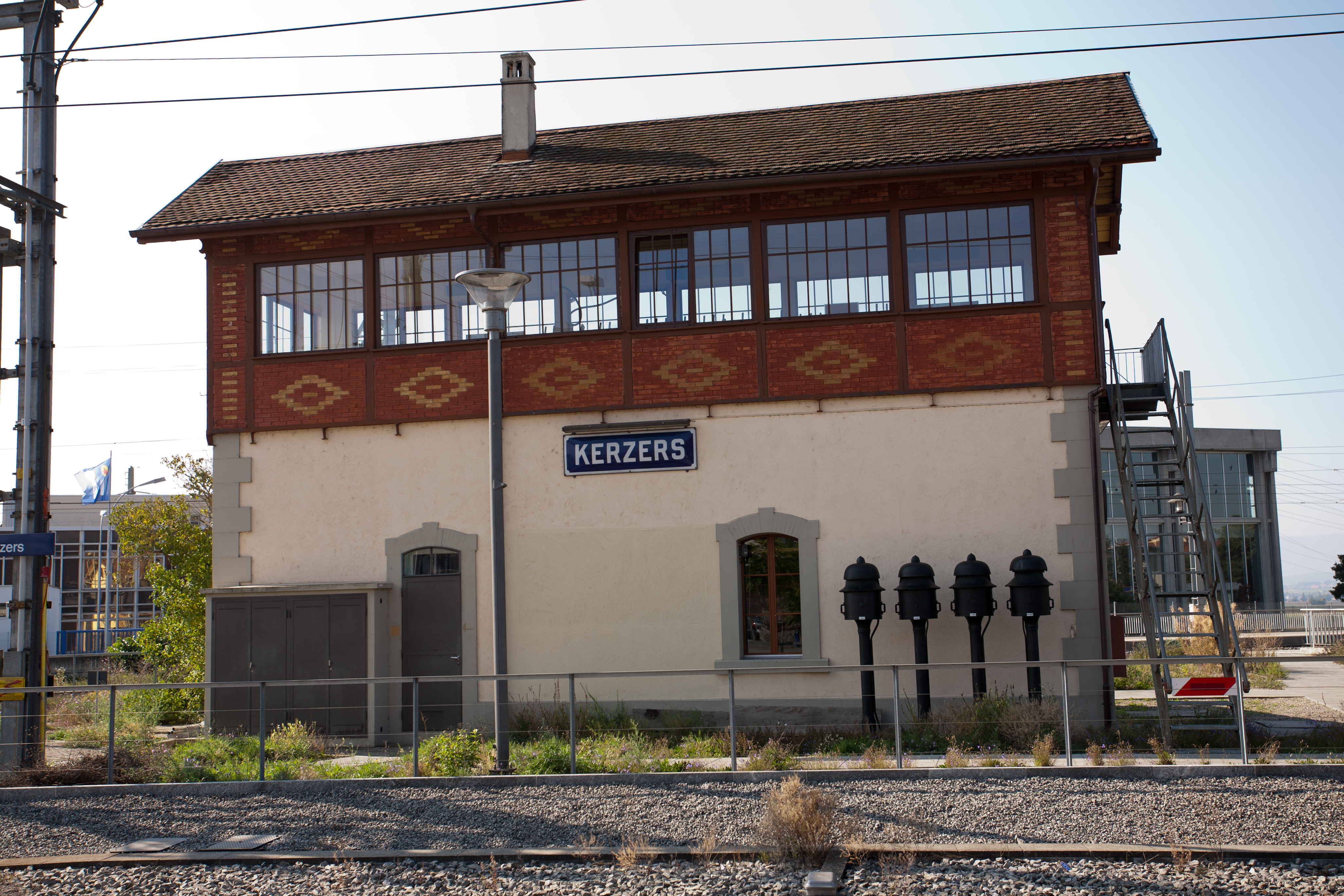 Kerzers Stellwerk